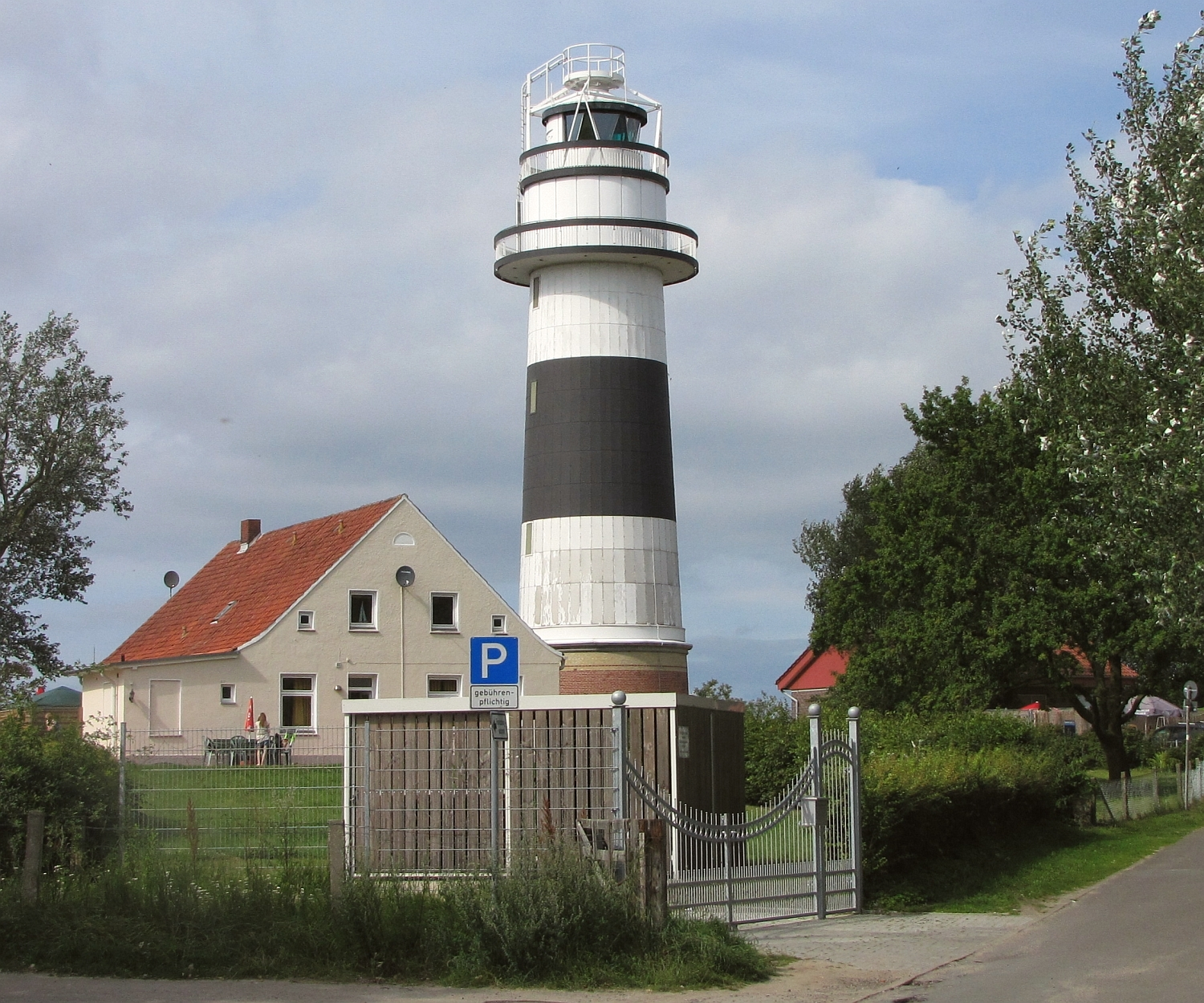 Leuchtturm Bülk, Höhe 29 m, Baujahr 1865 an der Kieler Förde, Gemeinde Strande, Kreis Rendsburg-Eckernförde in Schleswig-Holstein - Foto Wolfgang Pehlemann Steinberg/Ostsee IMG_1935 - RICHTIGSTELLUNG: BEI DIESEM LEUCHTTURM HANDELT ES SICH NICHT UM EIN KULTURDENKMAL